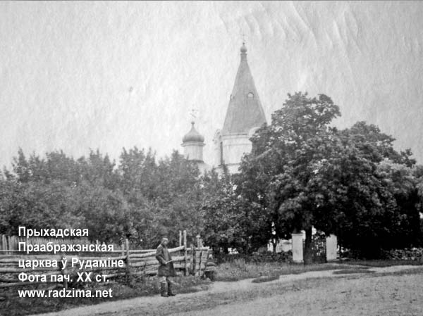 Беларуская (тарашкевіца): Рудаміна (Spaskaja). Спаская царква-мураўёўка